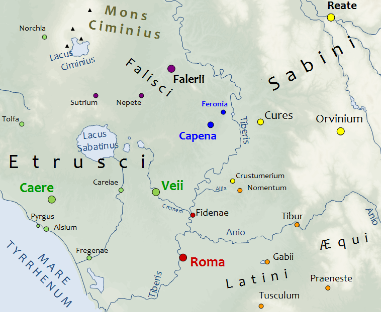 Capène autour du IVe siècle avant JC